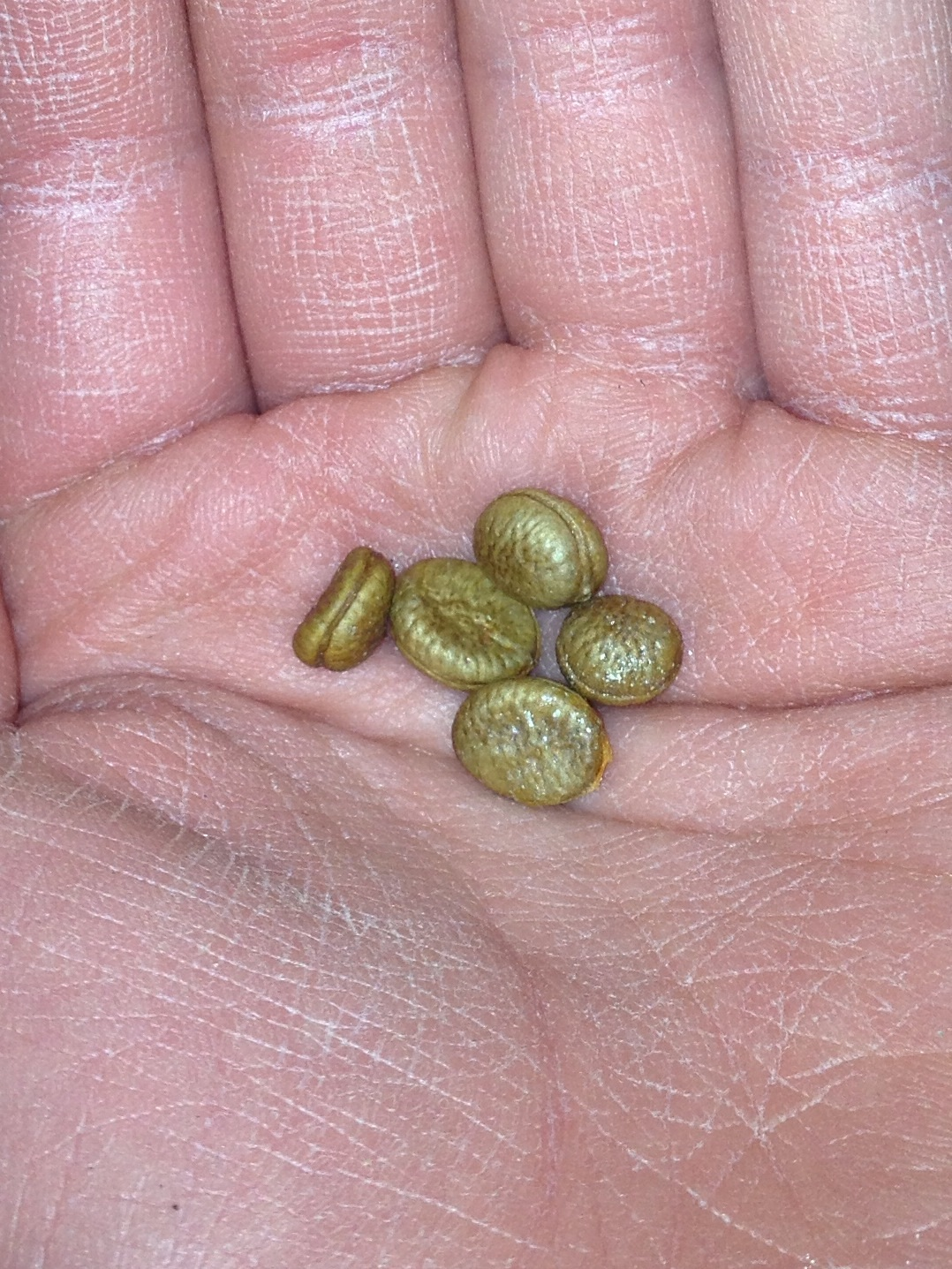 Seeds of Meiogyne cylindrocarpa .